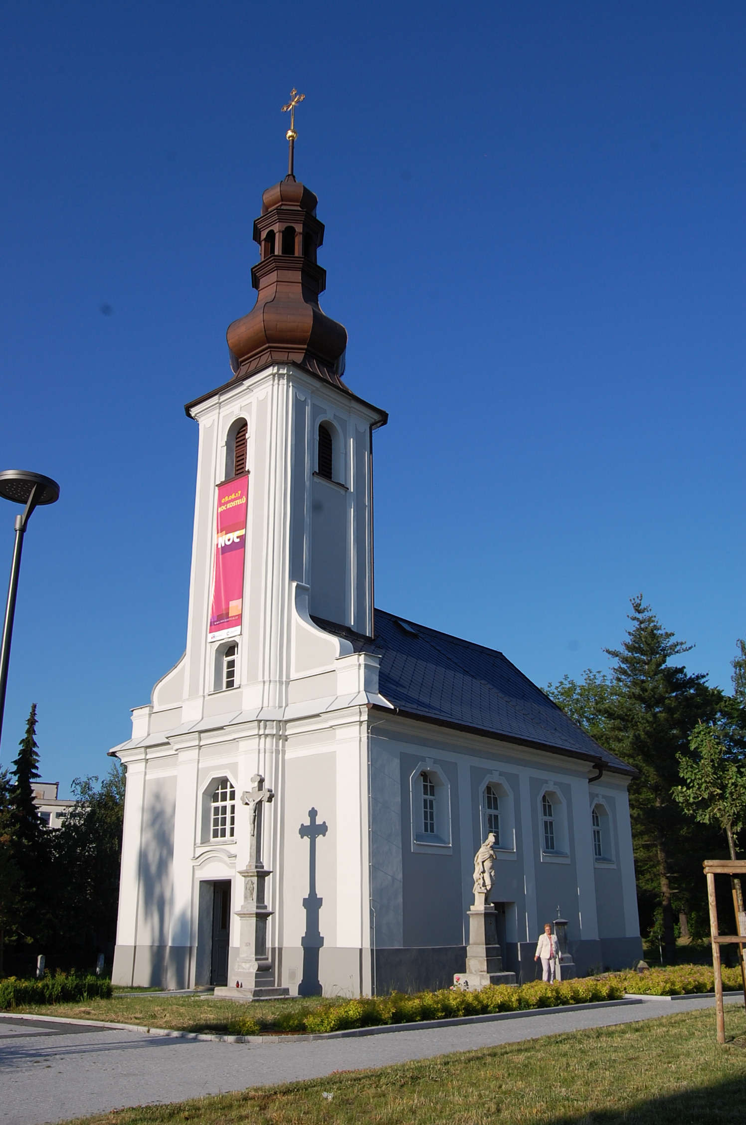 Kostel svatého Marka, pohled na západní část